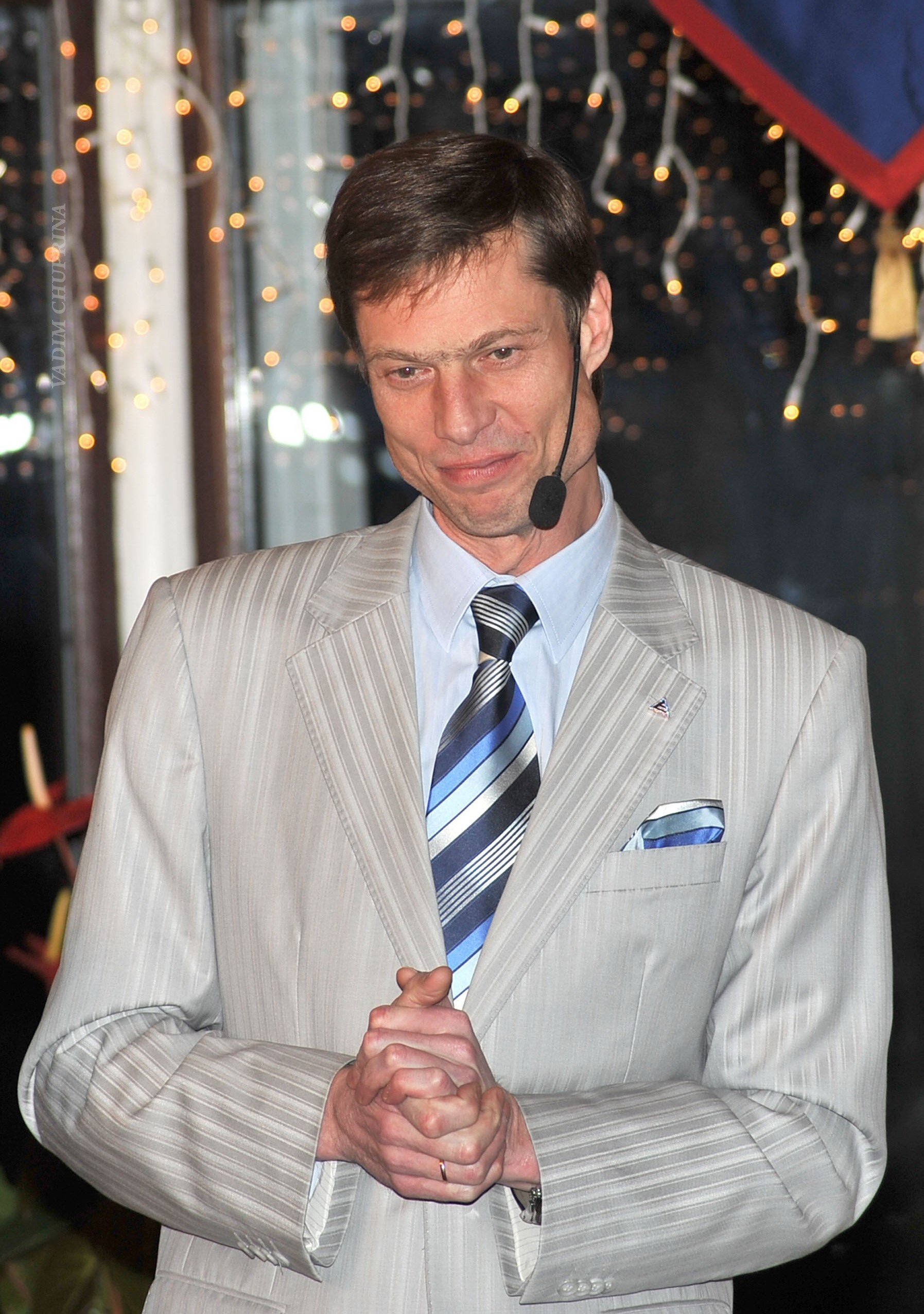 Моисеенко Владимир , фото Чуприна Вадим.